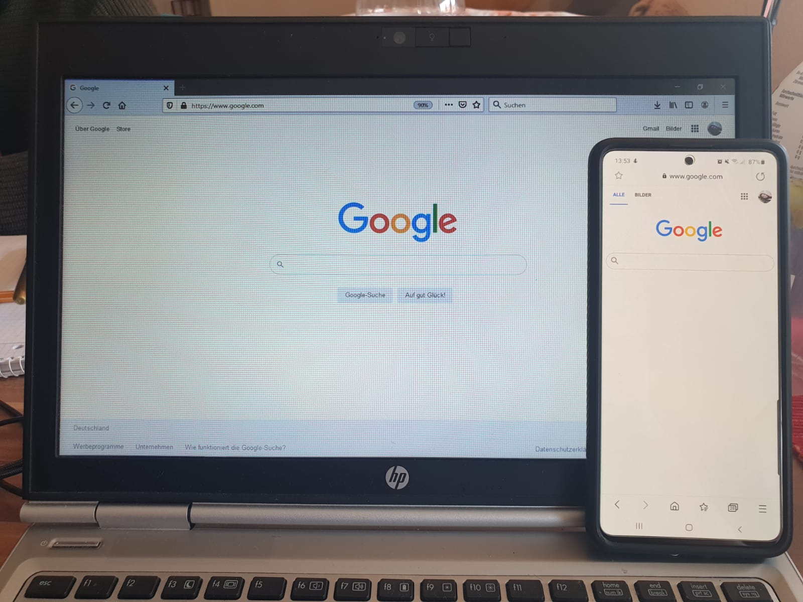 Das Bild vergleicht das Screendesign der Google-Startseite auf einem Laptop mit dem eines Smartphones.